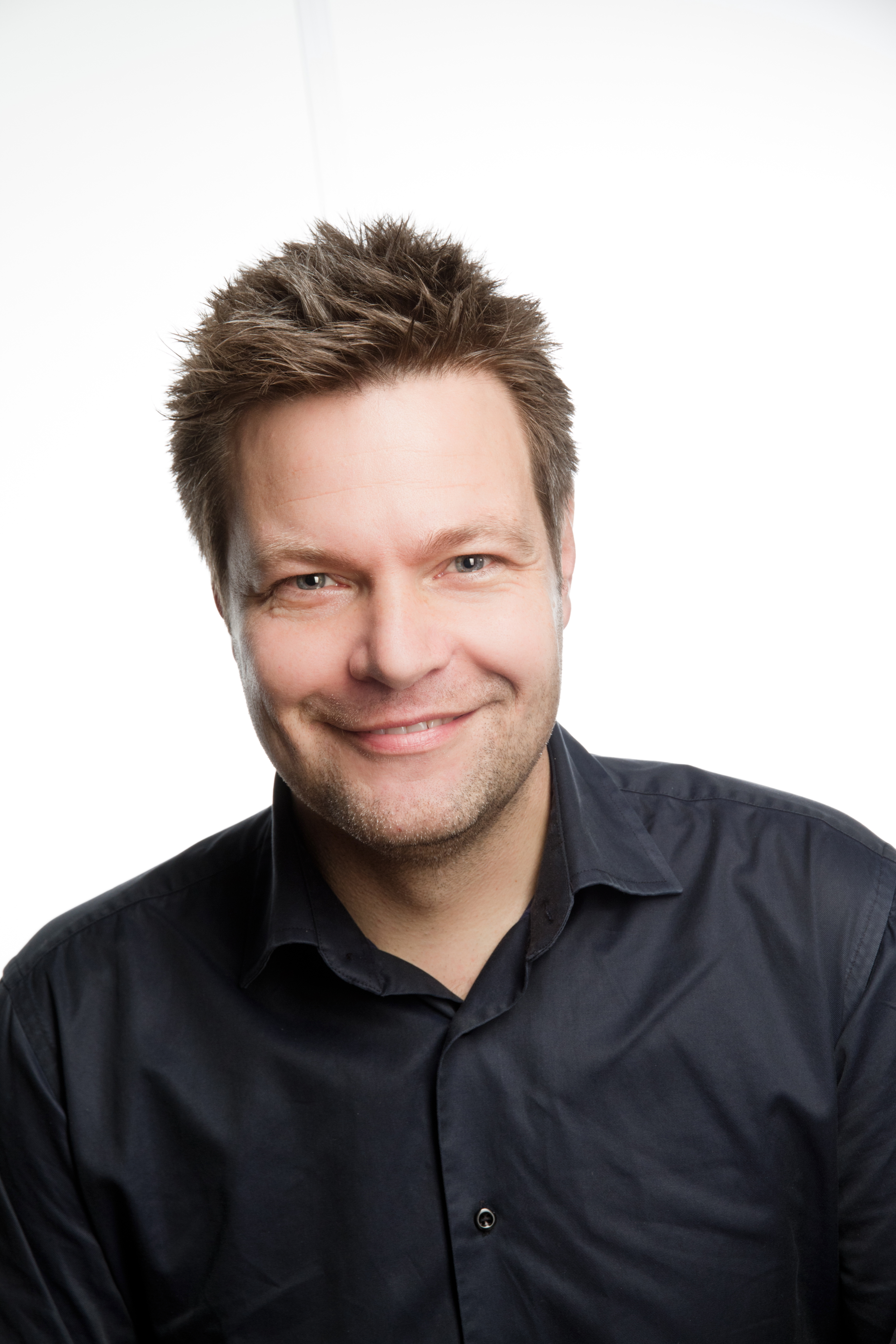 Robert Habeck, Landwirtschafts- und Umweltminister von Schleswig-Holstein.